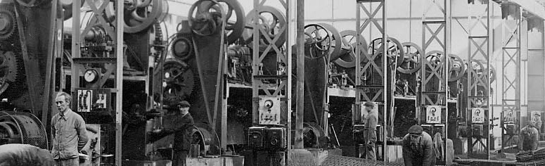 Atelier de déployage